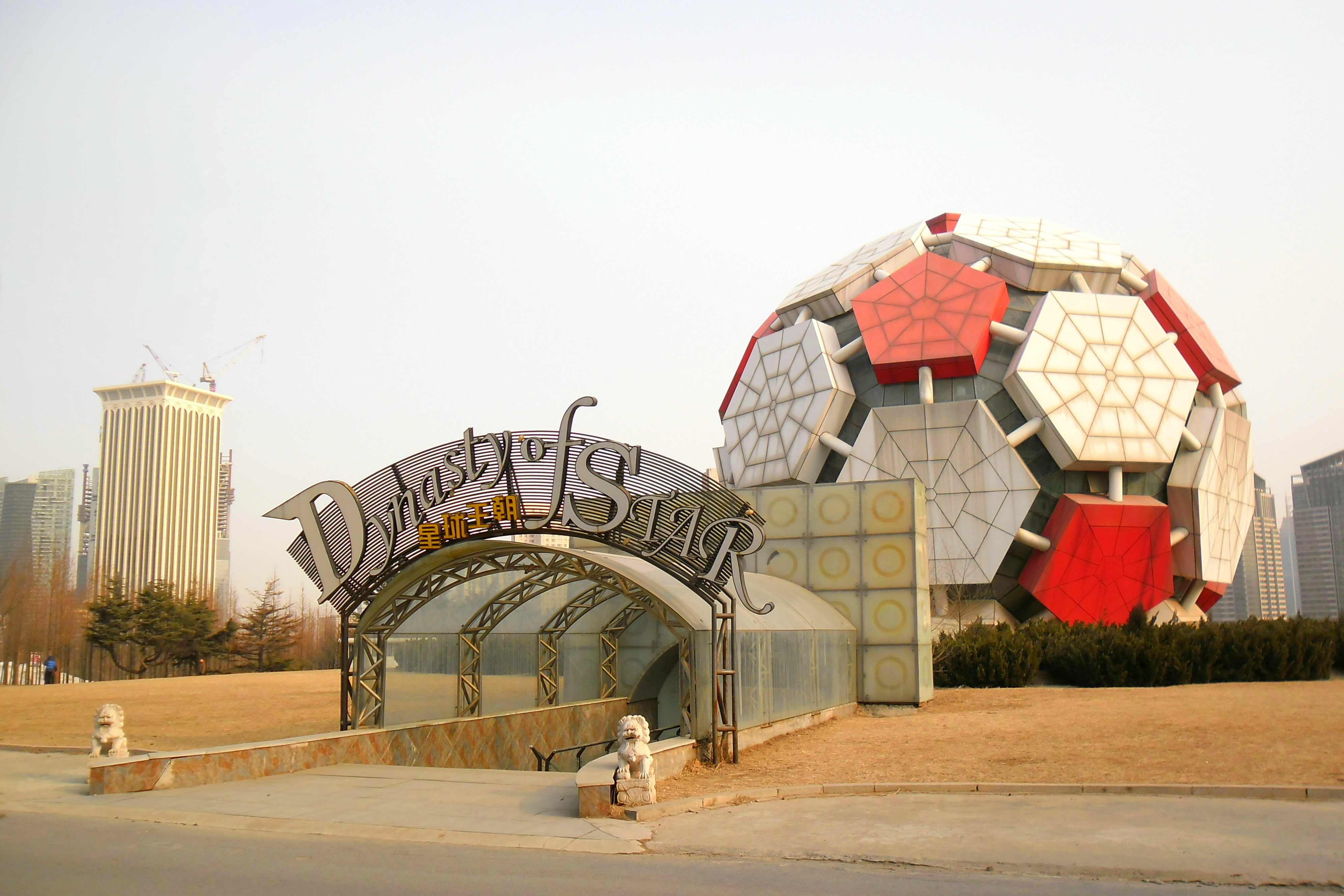 中文（中国大陆）: 辽宁省大连市